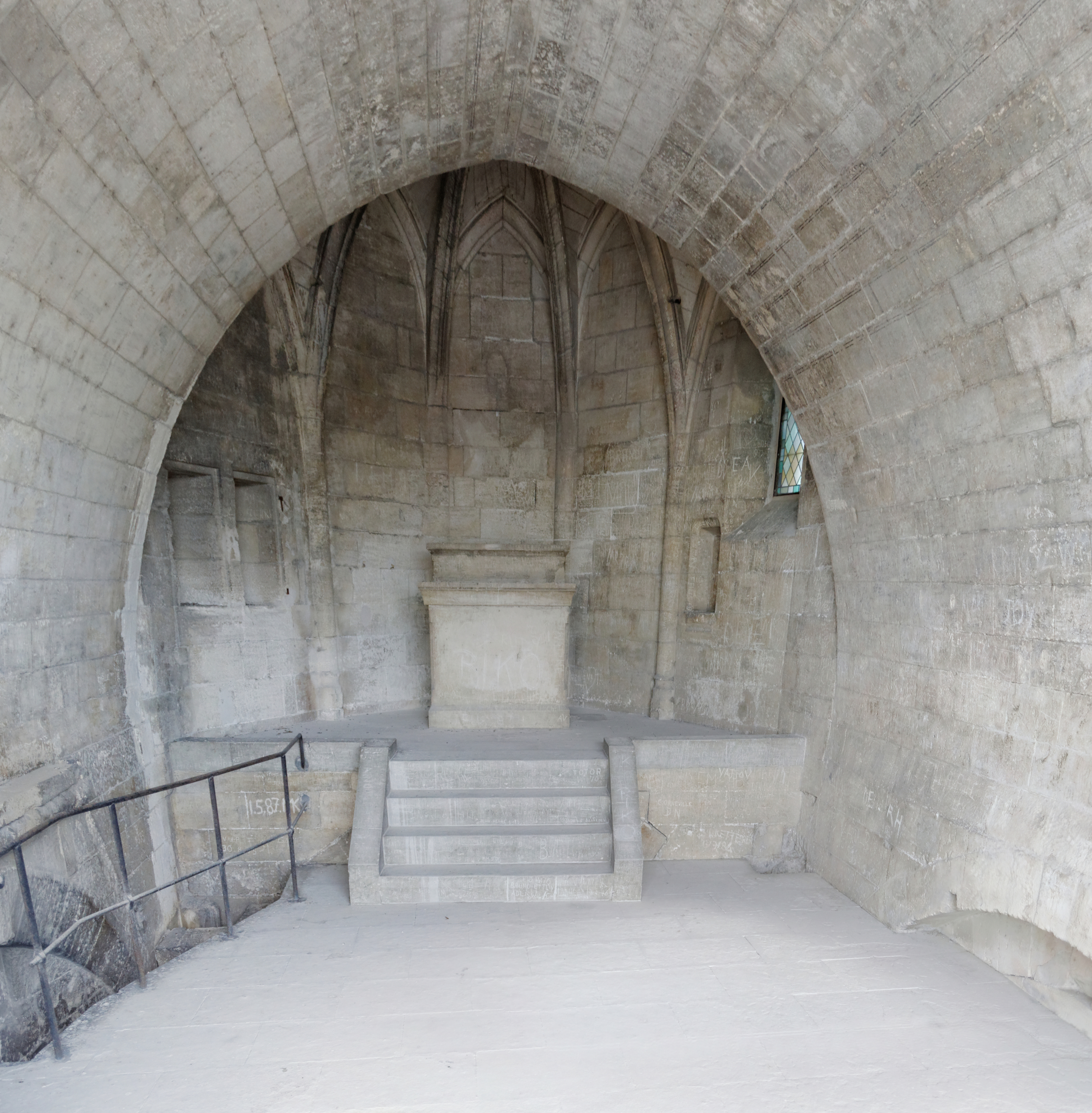 Chapelle Saint Bénézet, sur le pont Bénézet, (Pont d'Avignon)